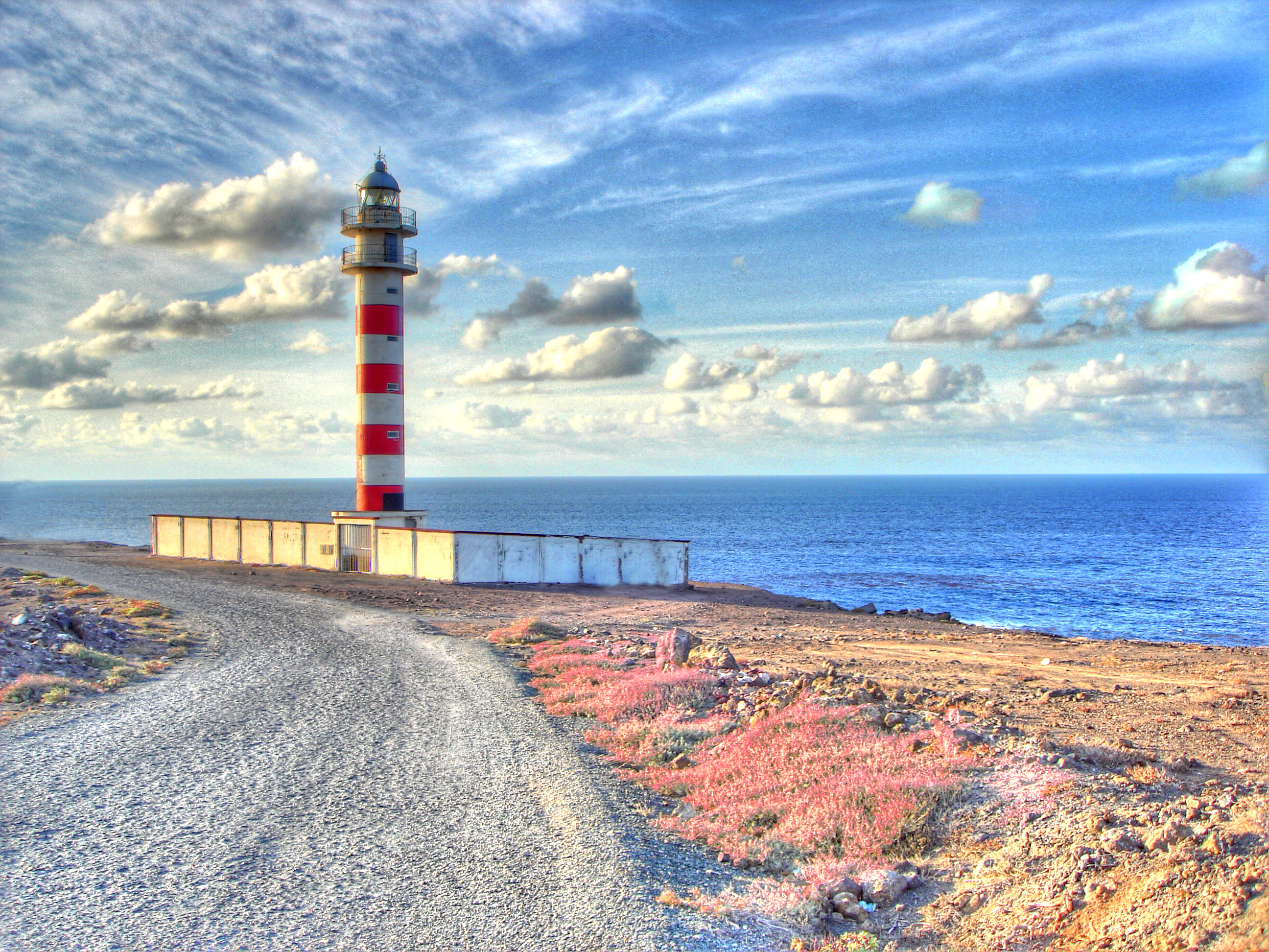 Nuevo faro de Sardina de Gáldar (Gran Canaria - Islas narias)